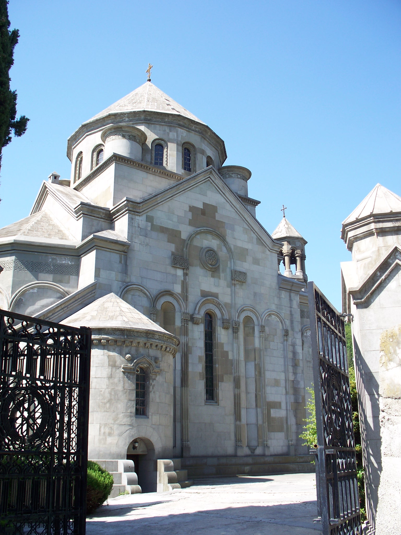 Церква вірменська, Ялта, вул. Загородня, 3, літ. А